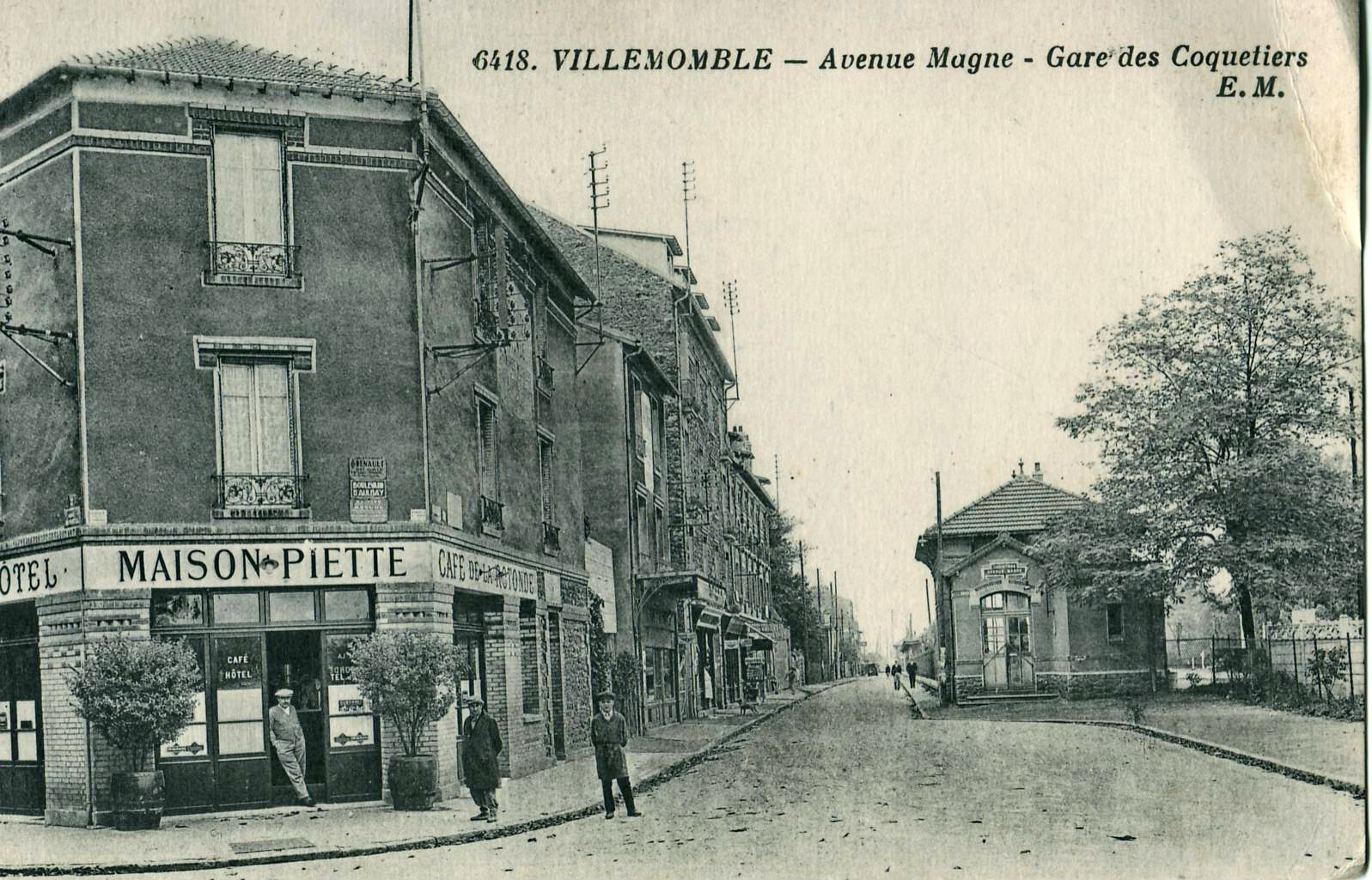 Carte postale ancienne éditée par EM, n°6418 : VILLEMOMBLE - Avenue Magne - Gare des Coquetiers